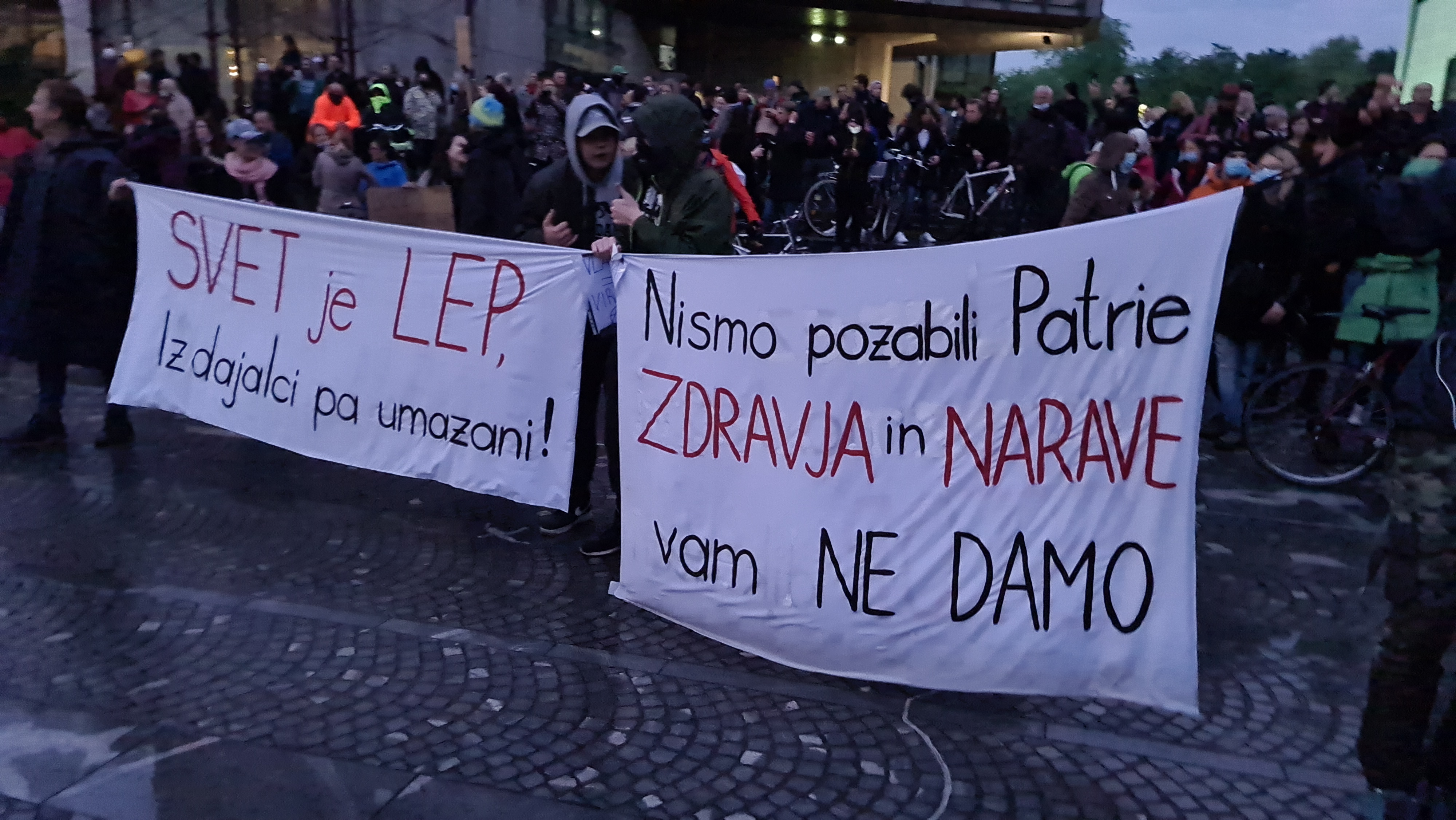 Kolesarski protest 15. maja v Ljubljani.